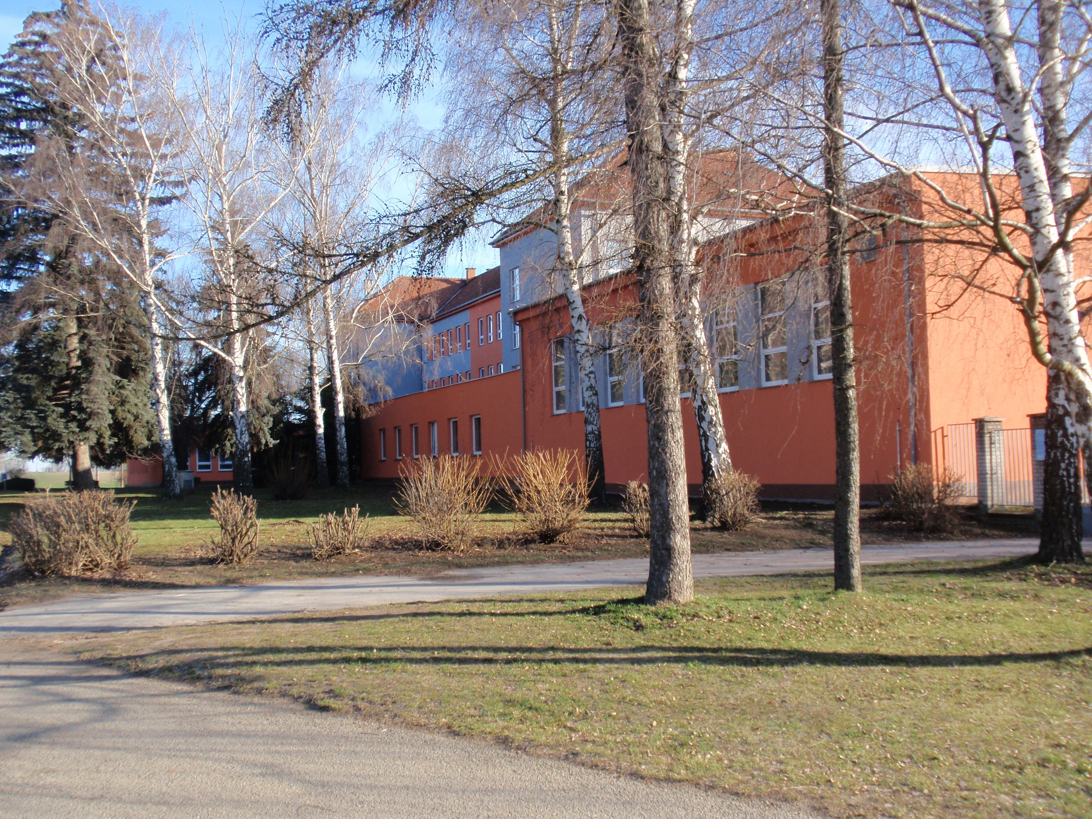 Dědice, Základní škola Morávkova na Kozině, tělocvična